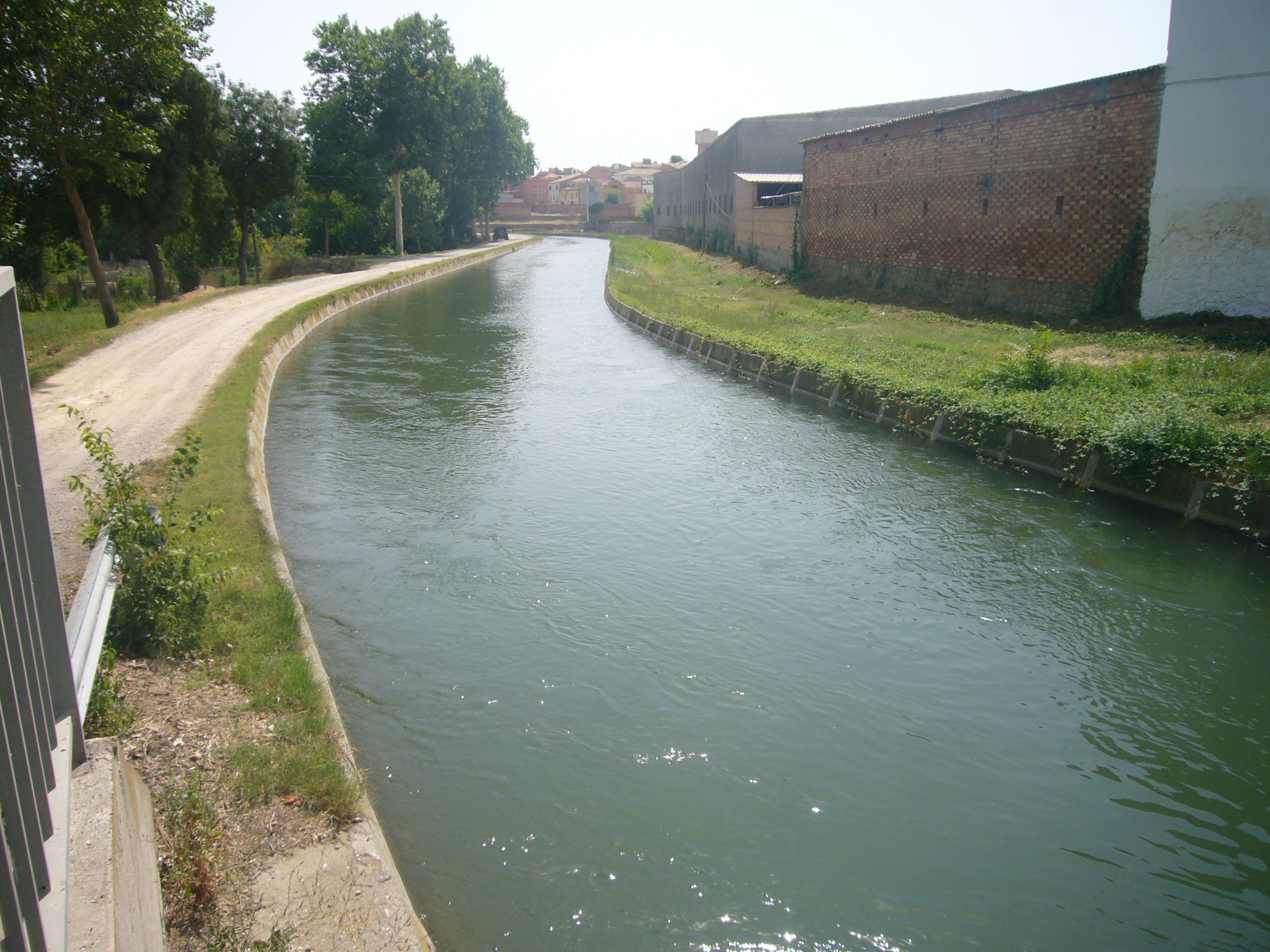 Agramunt - Vista del Canal d'Urgell